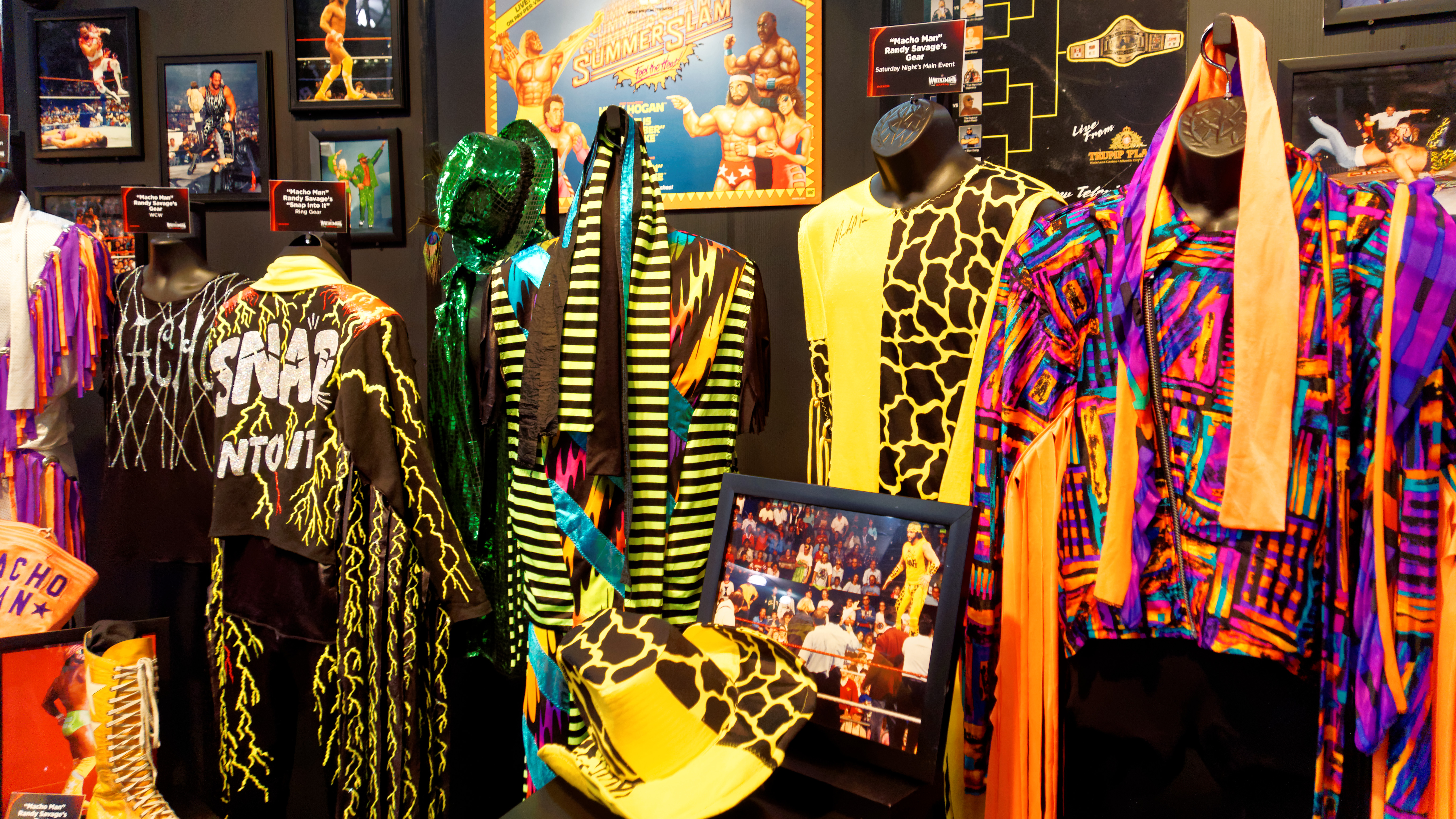 2015-03-26_18-19-57_ILCE-6000_1964_DxO